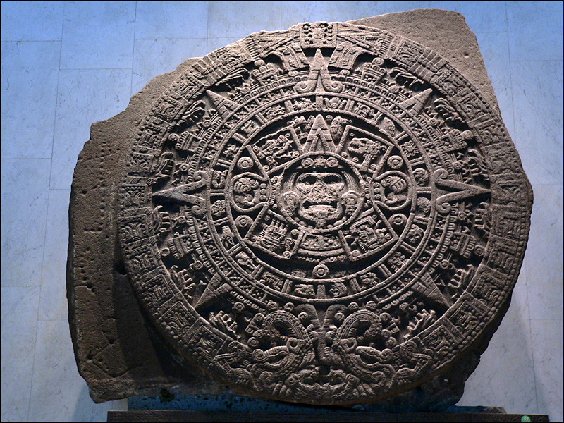 Piedra del Sol (conocido como Calendario Azteca)